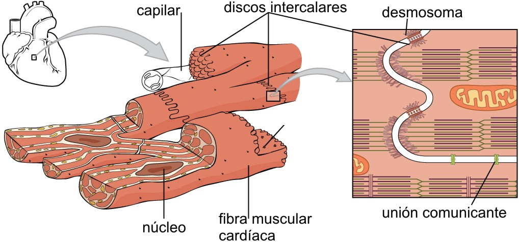 diagram of a cardiac cell